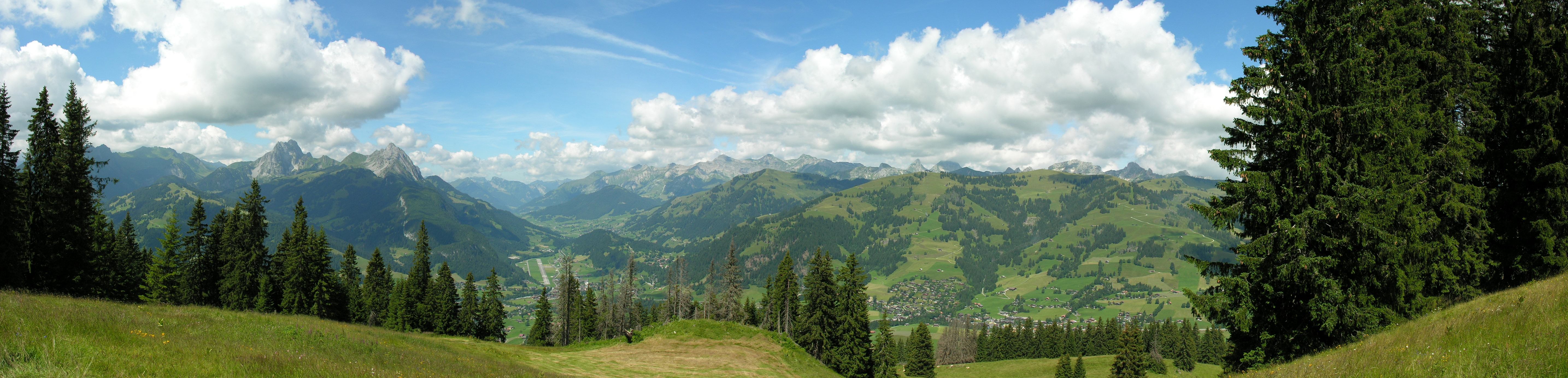 Hornberg Saanen